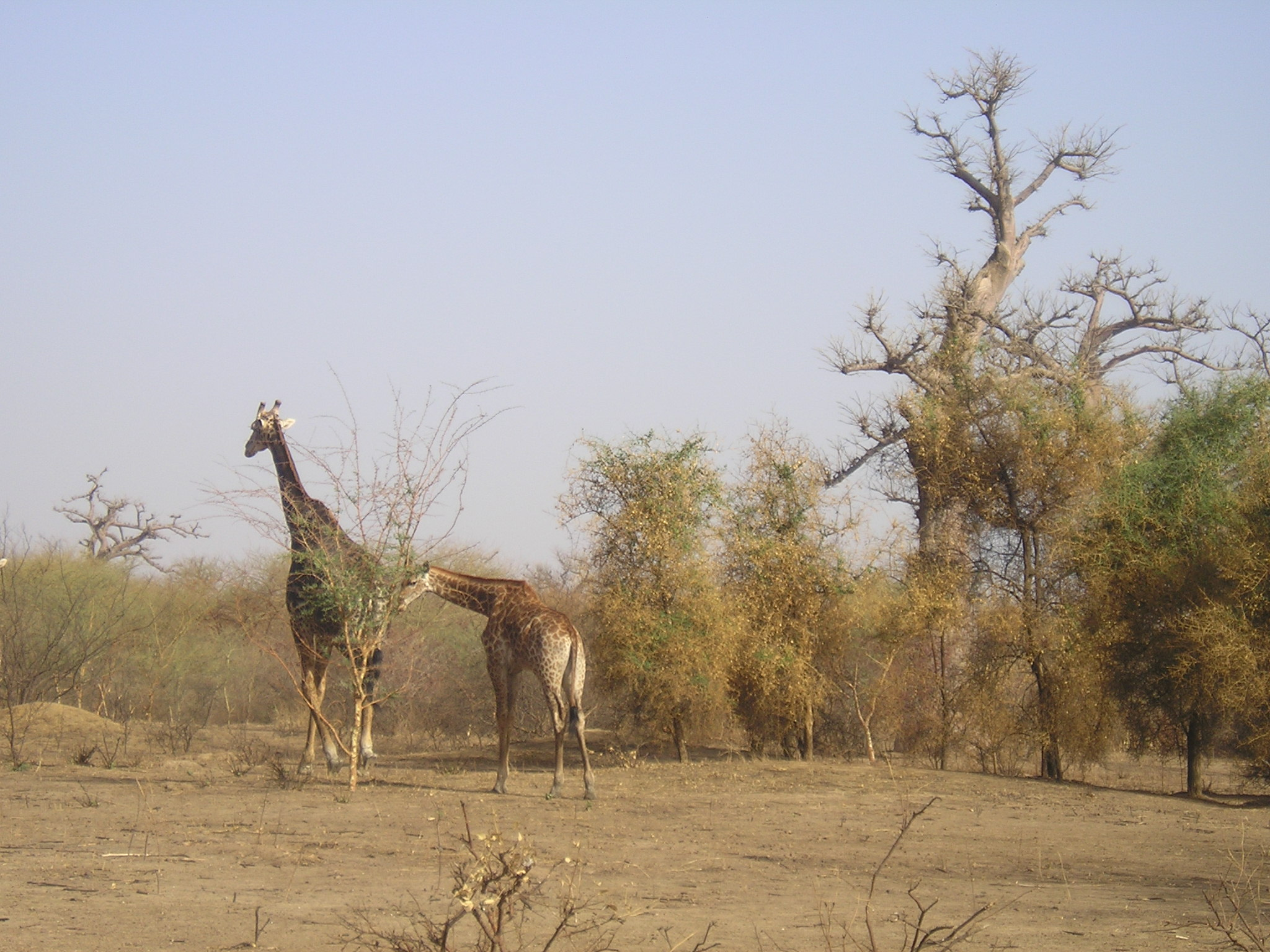 Girafon réserve de Bandia